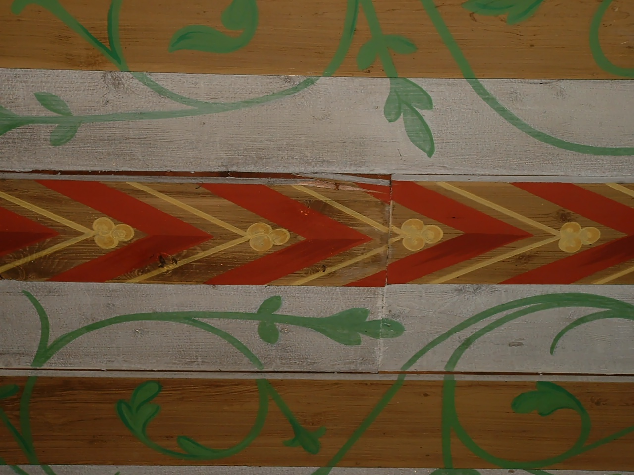 Evangelische Kirche Rhaunen,Deckenbemalung